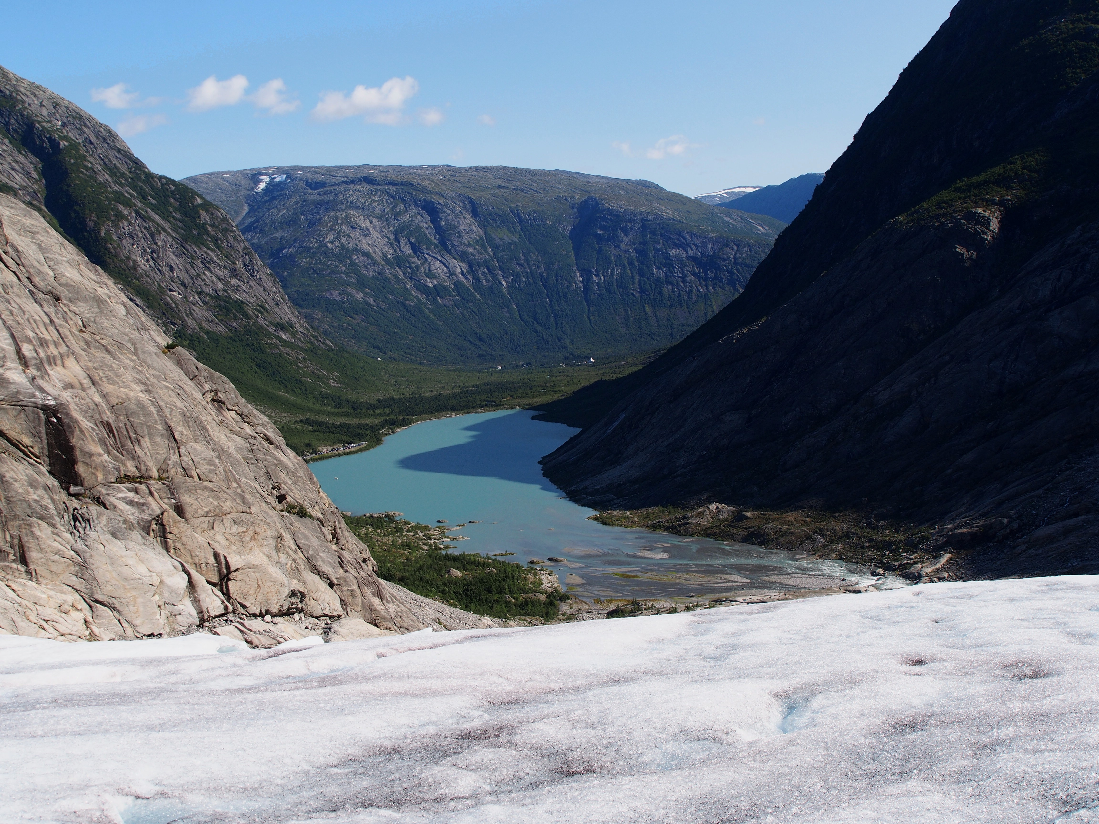 Glacial Lake Nigardsbrevatnet - 2013.08